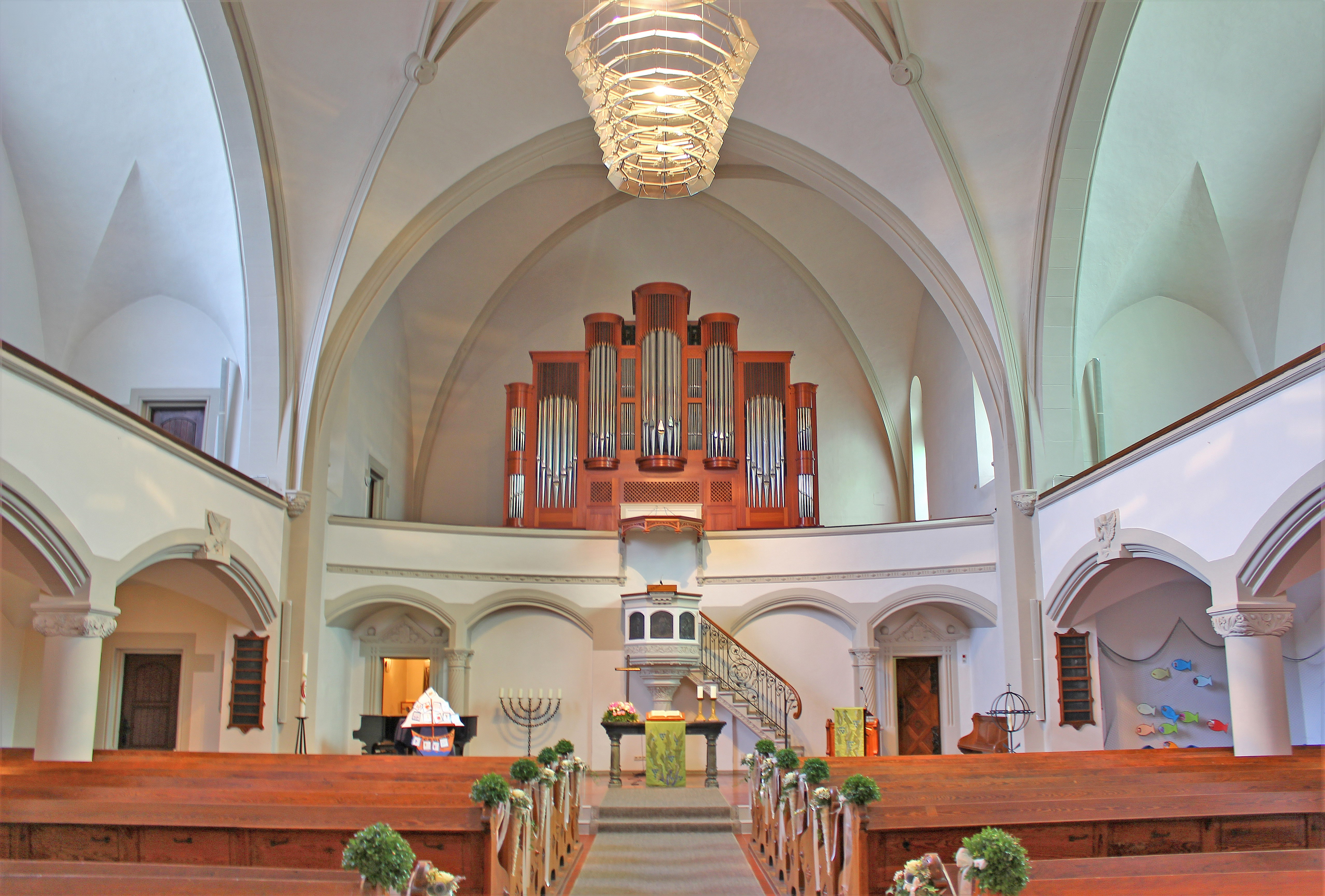 Blick ins Innere der evangelischen Kirche in Saarlouis, Saarland